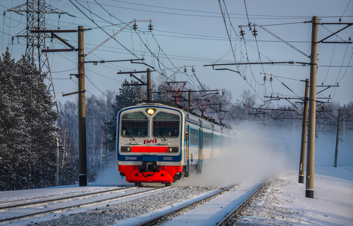 Электропоезд повышенной комфортности построен в восьмивагонной составности С завода поступил в депо Новосибирск (эксплуатировался в качестве межобластного экспресса сообщением Новосибирск — Омск, носил именное название "Ласточка") 08.2011 г. передан в депо Новокузнецк (заменял ЭД4МК-0051 на маршруте № 847/848 Новокузнецк — Новосибирск) 04.2013 г. — КР-1 на КрЭВРЗ 02.07.2013 г. совершил последний рейс на маршруте № 847/848 06.07.2013 г. возвращён в депо Новосибирск 03.2014 г. работал взамен ушедшего на ремонт ЭД4МК-0051